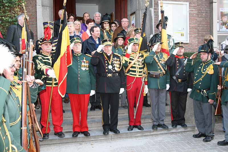 Samenkomst op dinsdagavond van alle soldatengroepen aan het voormalige gemeentehuis van Lembeek